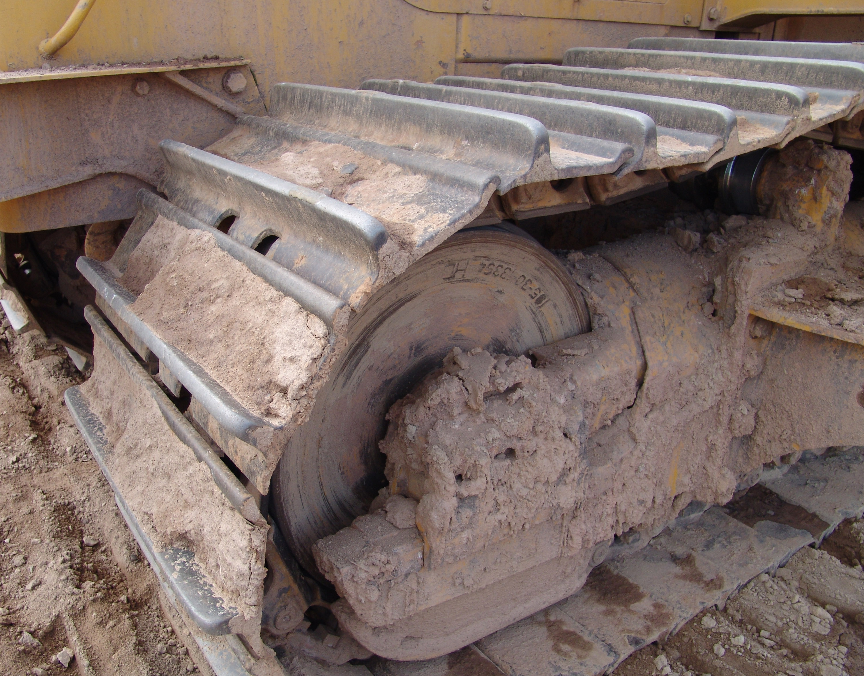 Komatsu Raupenkran